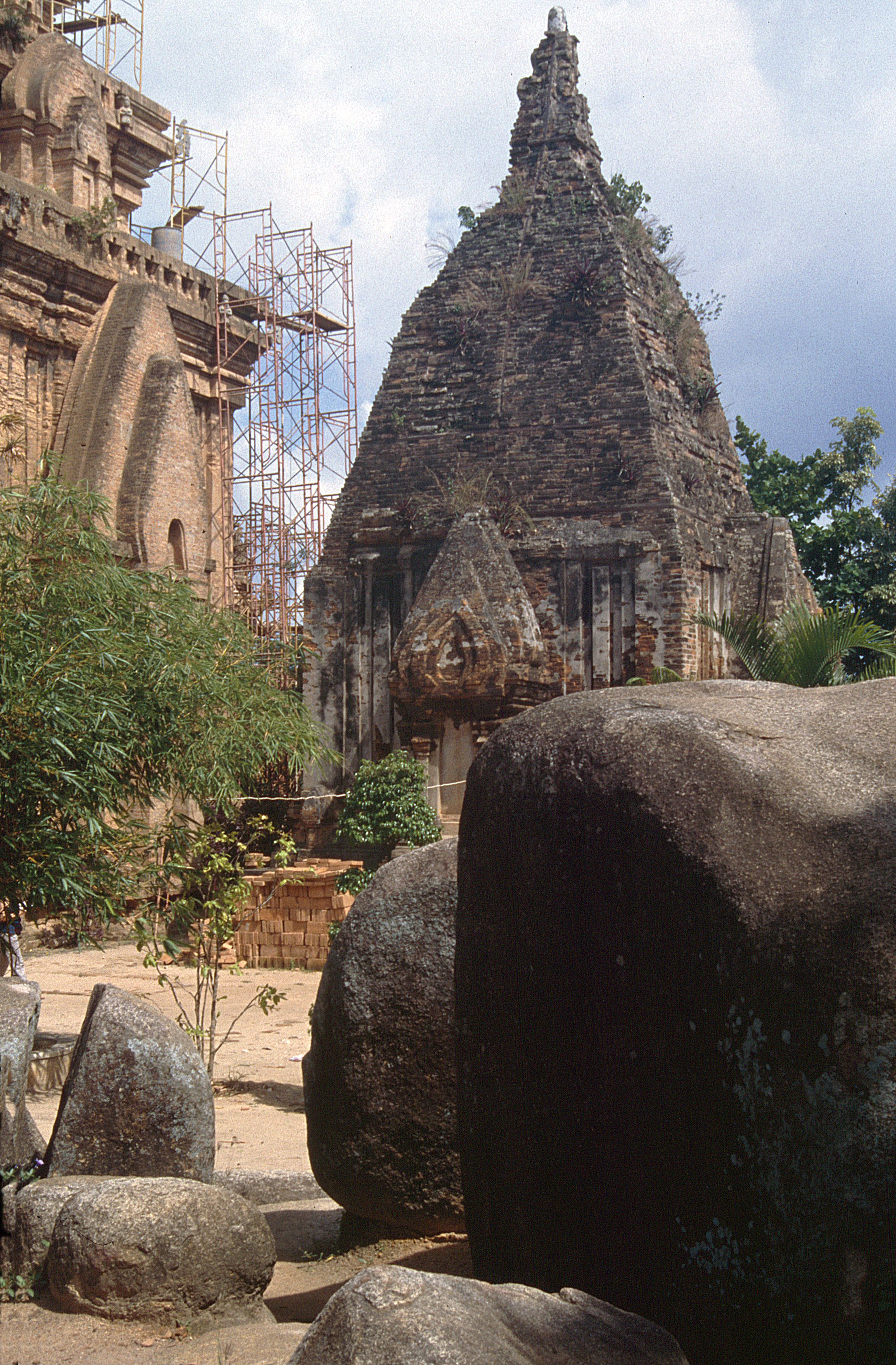 Nha Trang: Cham-Tempelanlage Po Nagar